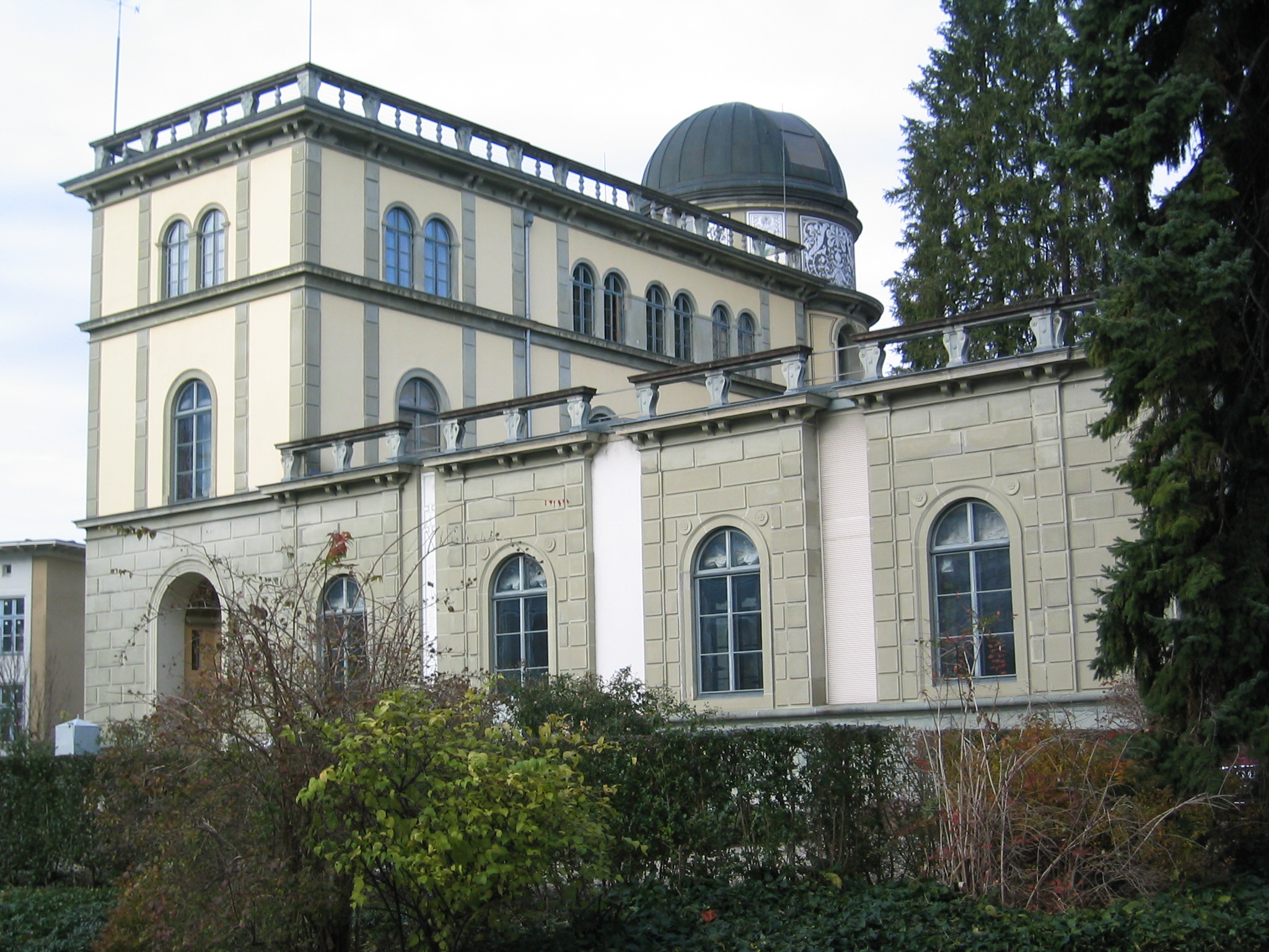 Südansicht mit Meridiansaal im rechten Flügel